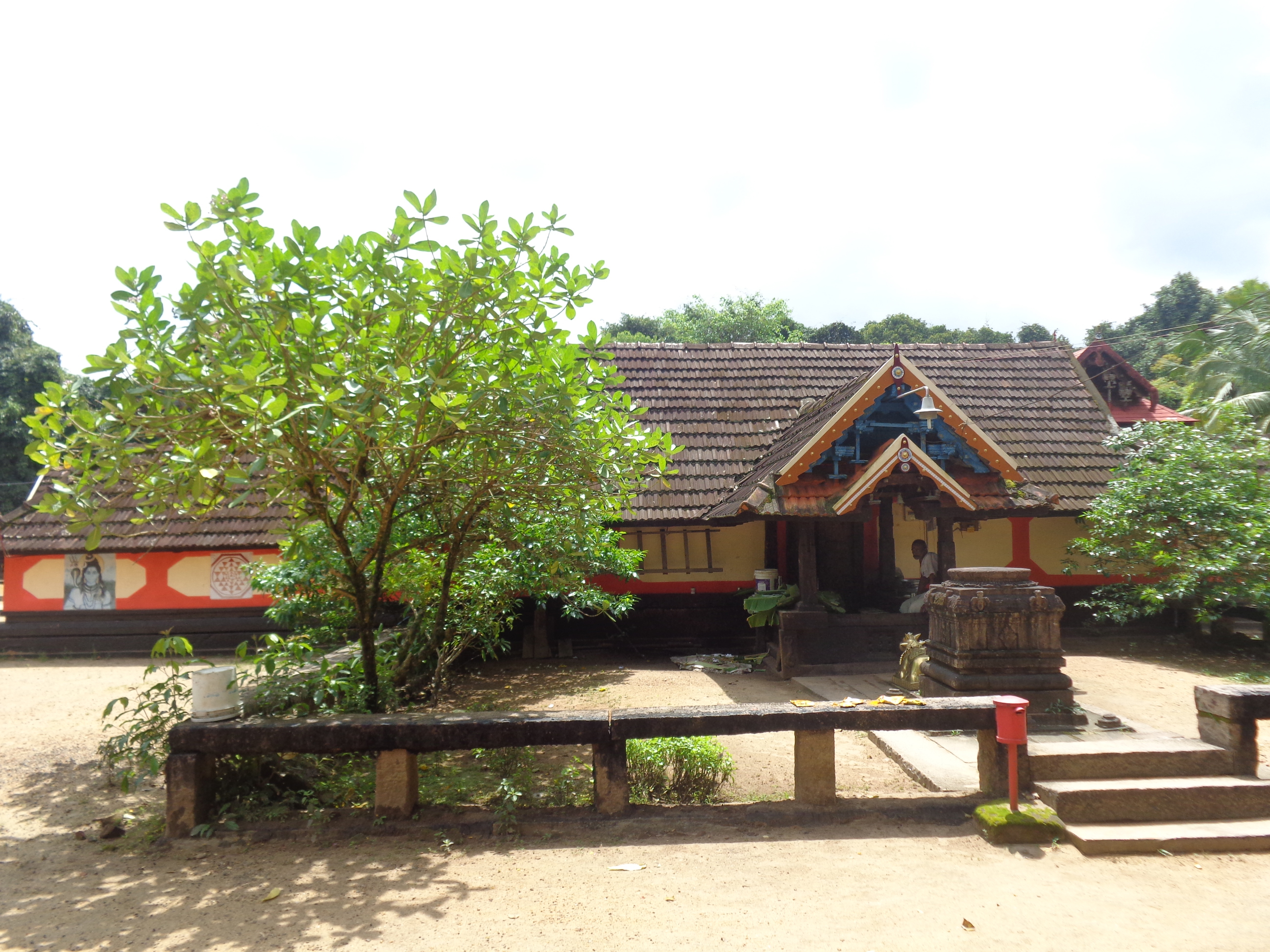 panayanar kavu